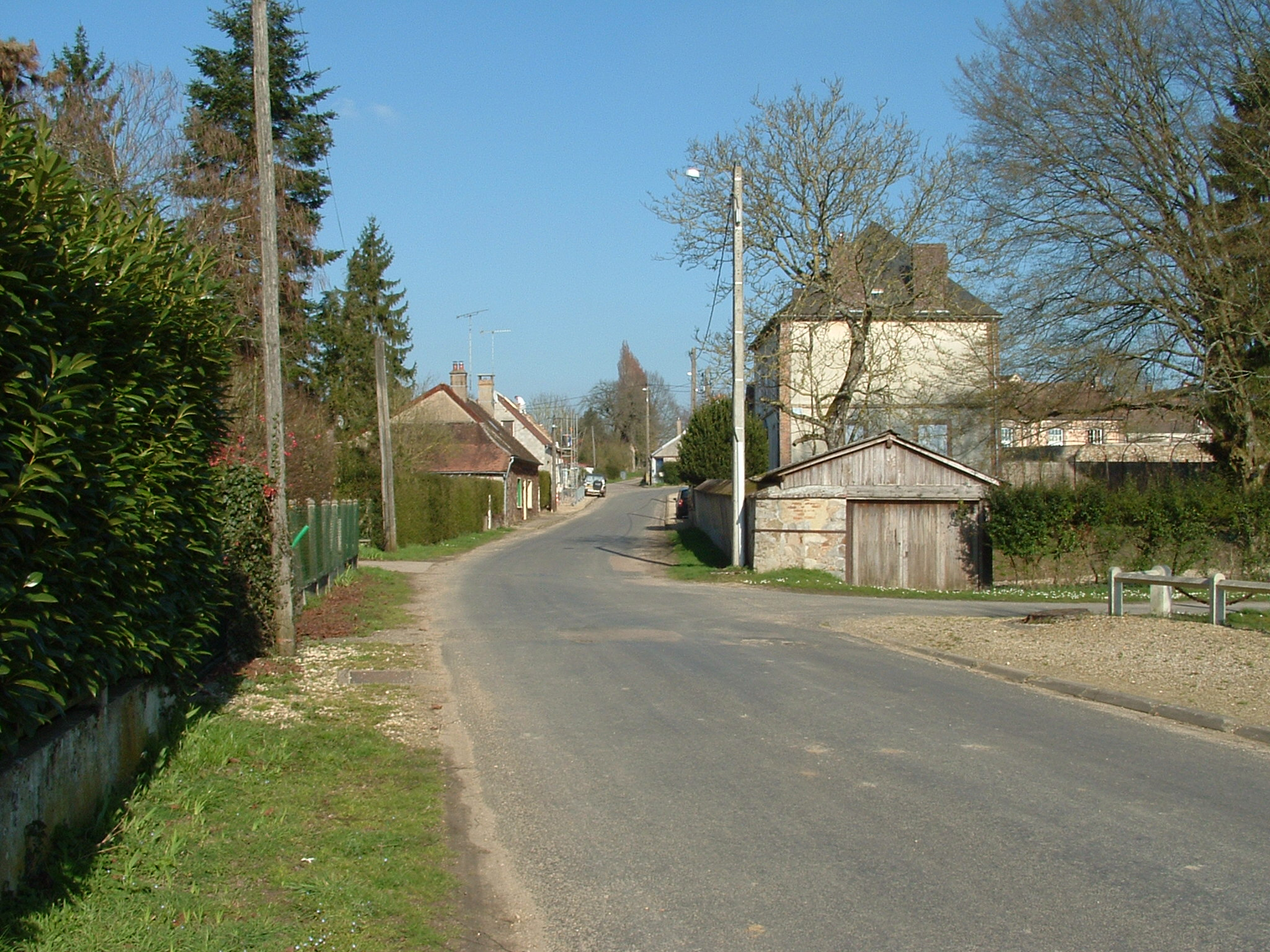 Village de Vernoy (Yonne, France).